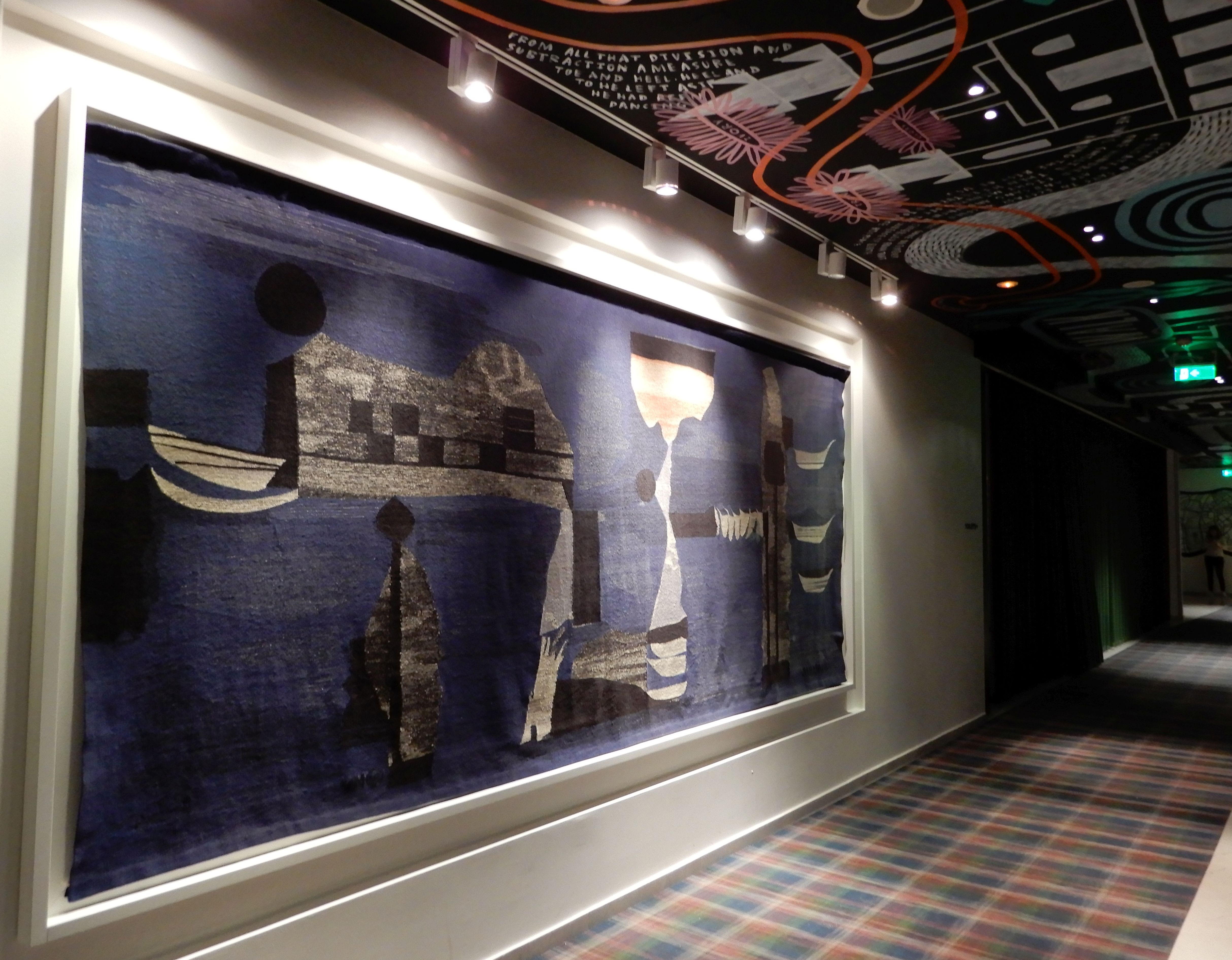 Jan Hladík-Jenny Hladíková,, Tapisérie v Parkhotelu (Mama Shelter) Praha, 1986